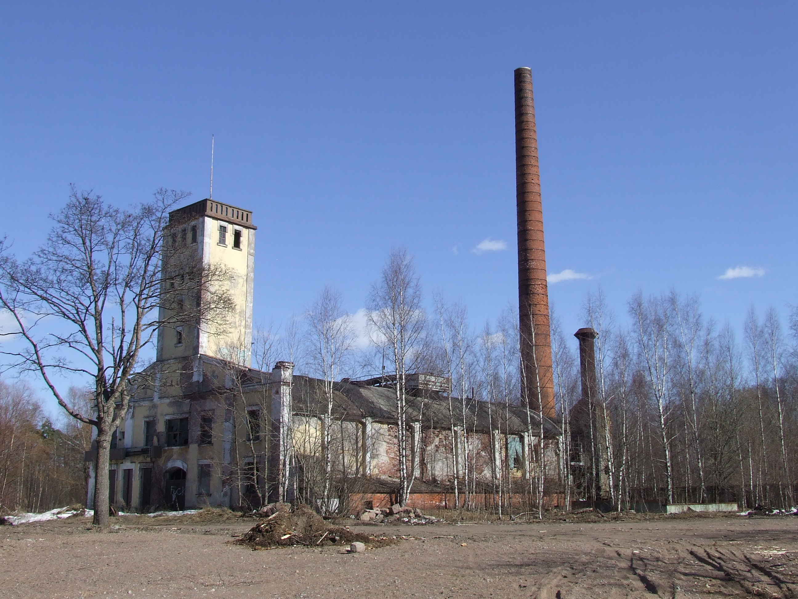 Hallan sahan voimalaitos Kotkassa